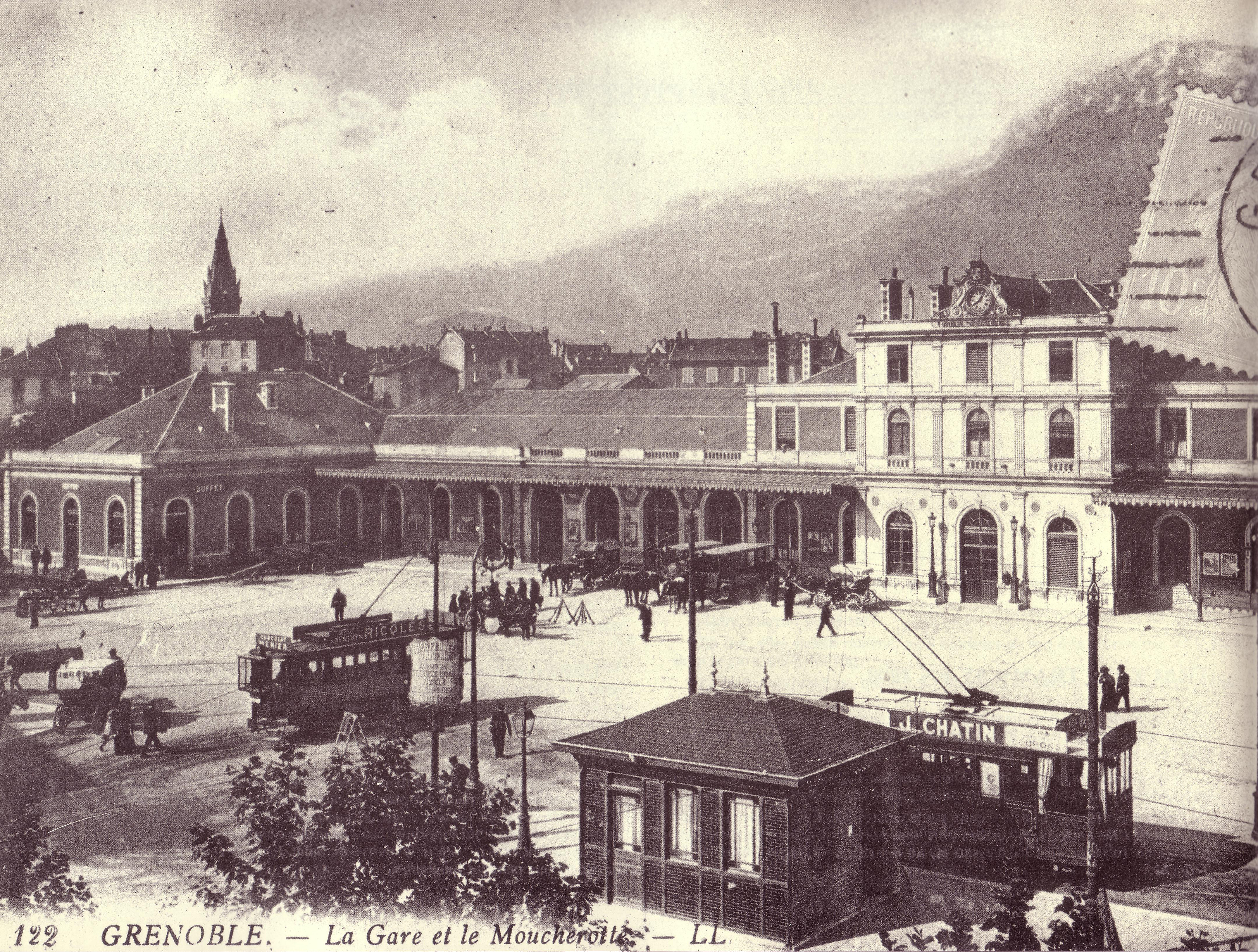 Gare PLM de Grenoble vers 1901, à droite un tramway TGC, à gauche un tramway SGTE